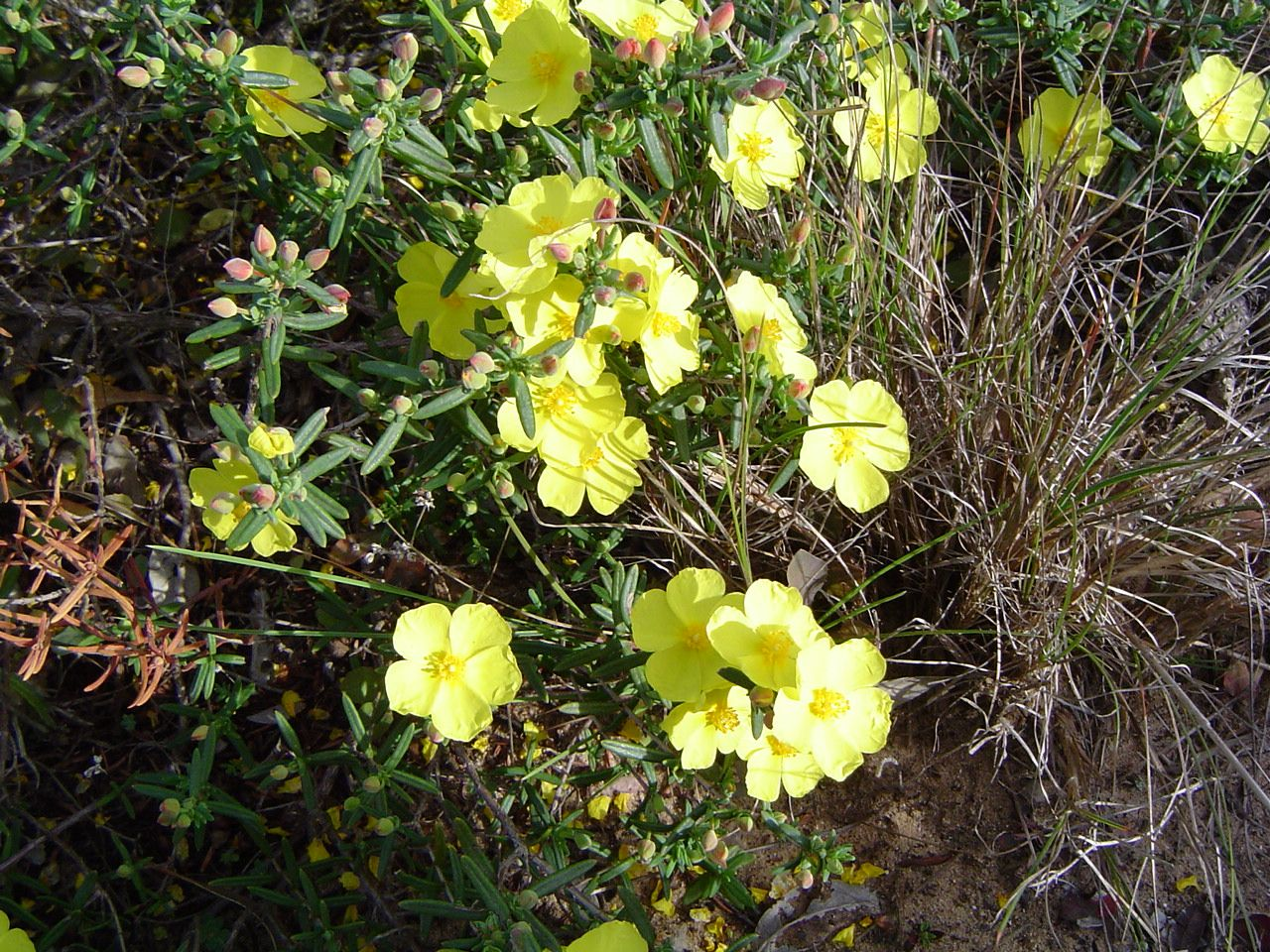 Halimium commutatum fotografía tomada en Cádiz, España